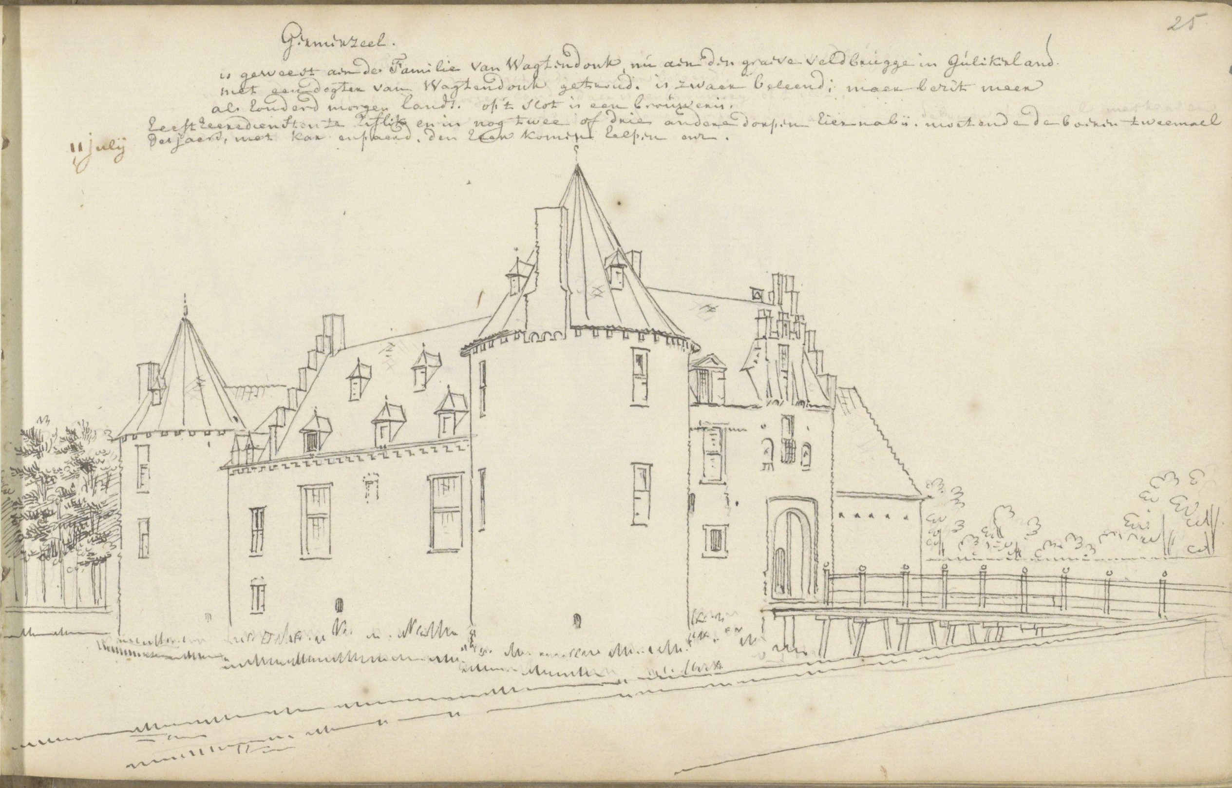 Pentekening uit rijksprentenkabinet van Abraham de Haen uit 1731